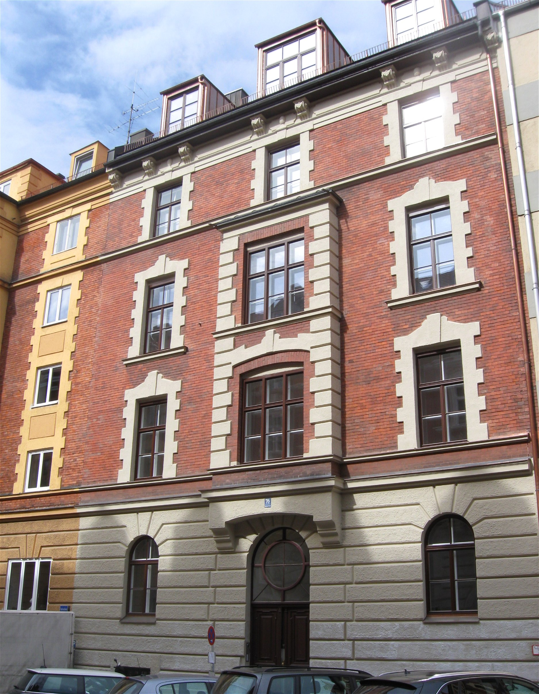 Adalbertstraße 76; Mietshaus, nordische Renaissance, Rohbackstein mit Putzgliederung und Erkerturm, um 1884-87 von Johann Widmann; malerische Gruppe mit den gleichartigen Häusern Nr. 70, 72, 76, 78 und 80.